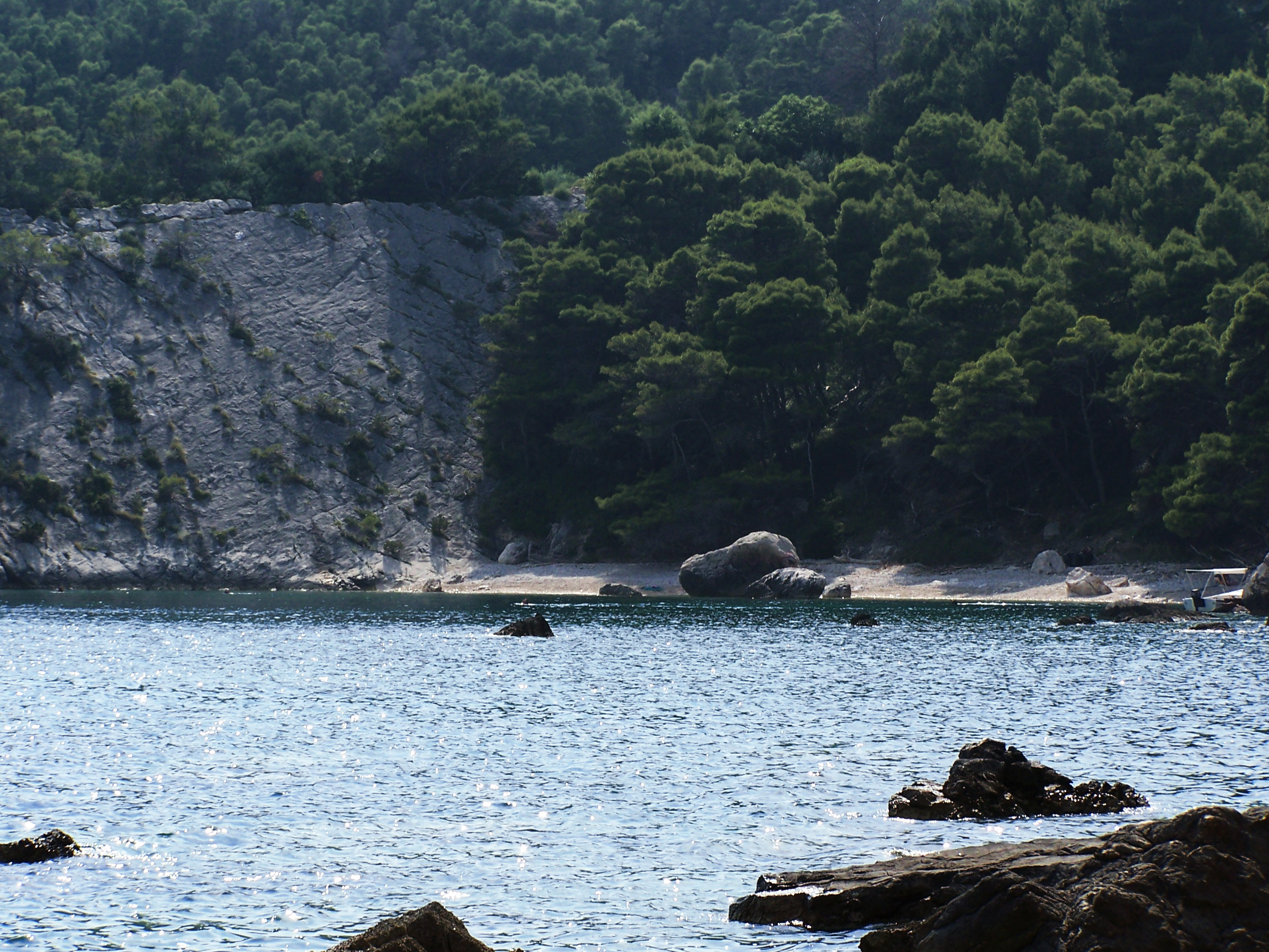 Milna, Hvar